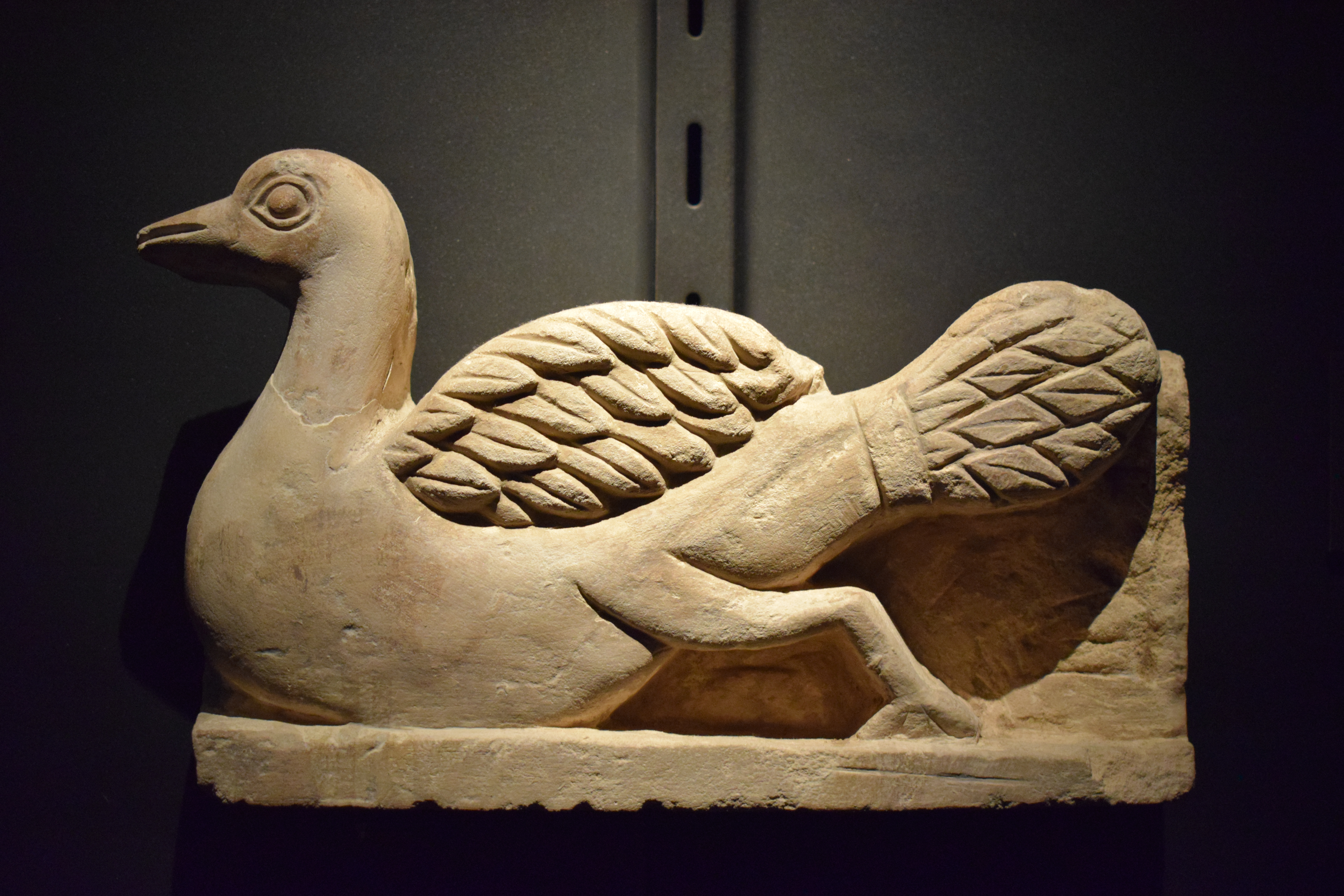 Oiseau Motif décoratif Monastère de Baouit, Égypte VIe-VIIe siècle av. J.-C. Fondation Martin Bodmer (Suisse)